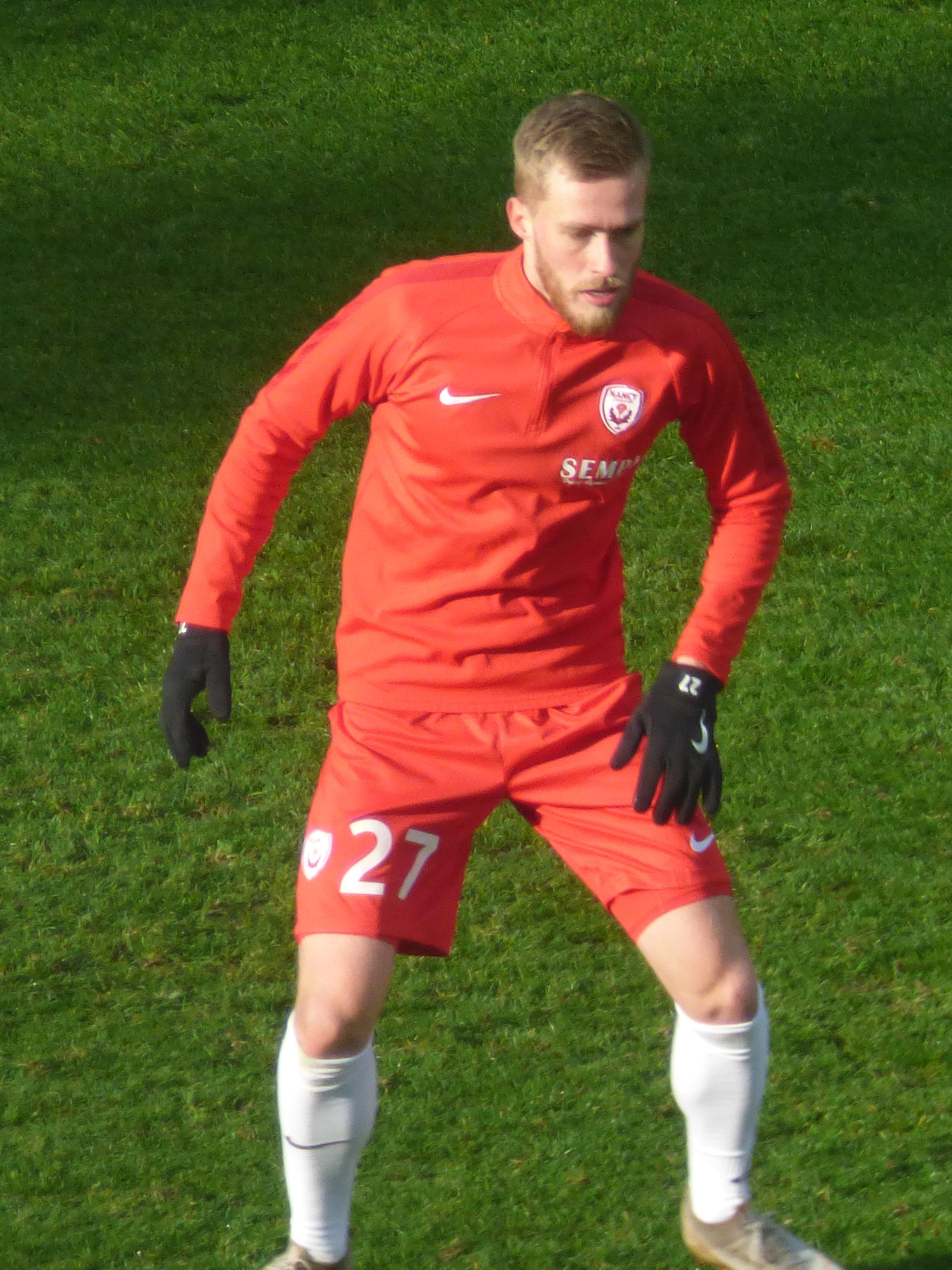 Alexis Busin avant le match RC Lens / AS Nancy-Lorraine, comptant pour la vingt-et-unième journée du championnat de France de football de Ligue 2 2018-2019, le 19 janvier 2019, au Stade Bollaert-Delelis de Lens.